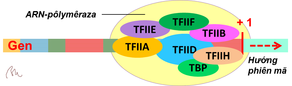 Các phân tử protein chủ yếu họp thành "phức hợp tiền khởi đầu phiên mã" (PIC).